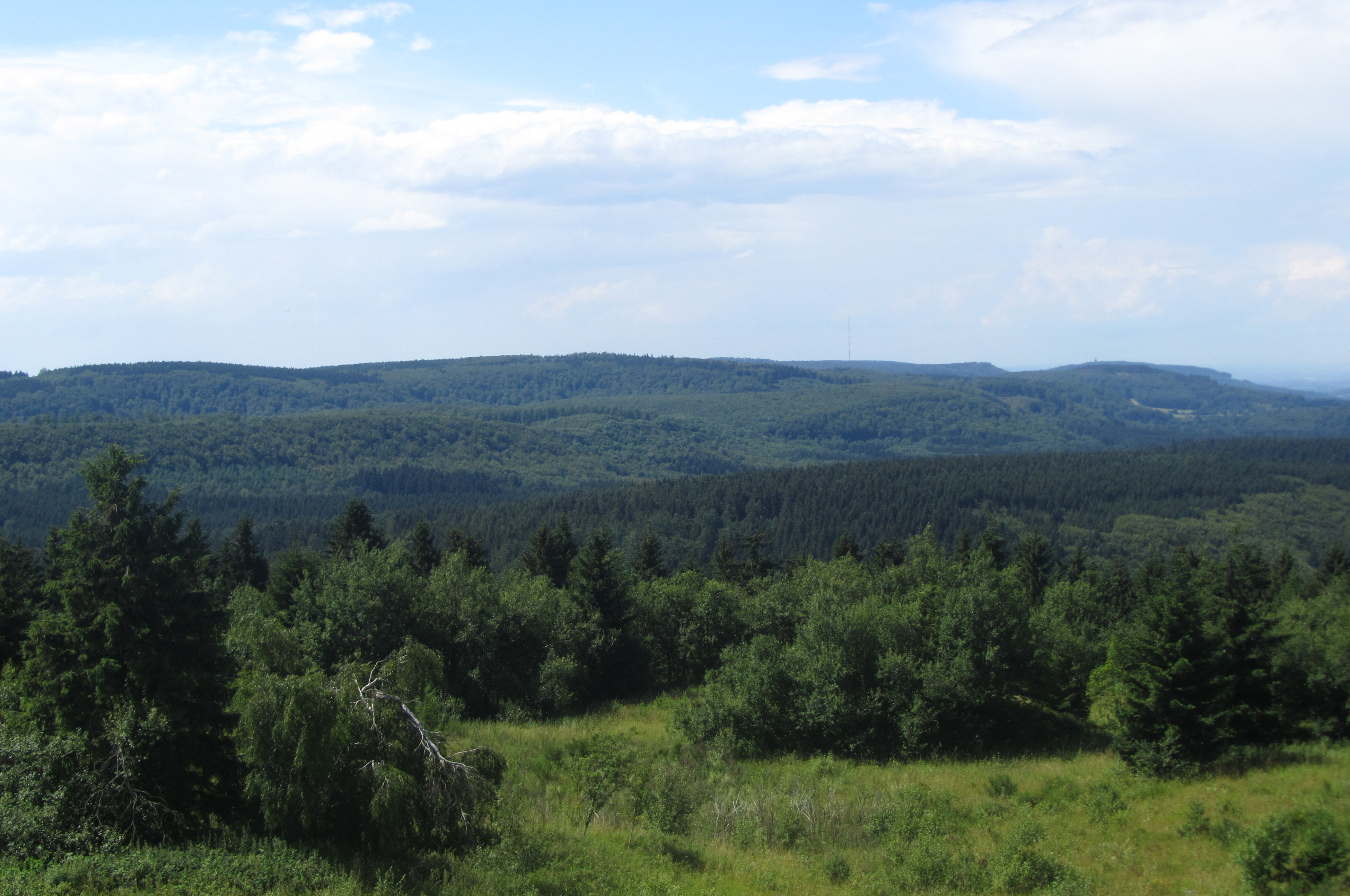 Blick vom Eggeturm auf dem Velmerstot (468 m) im Eggegebirge zum Teutoburger Wald mit dem Barnacken (446 m) als höchster Erhebung in der Bildmitte. Rechts davon der Sendemast auf dem Bielstein und das Hermannsdenkmal.